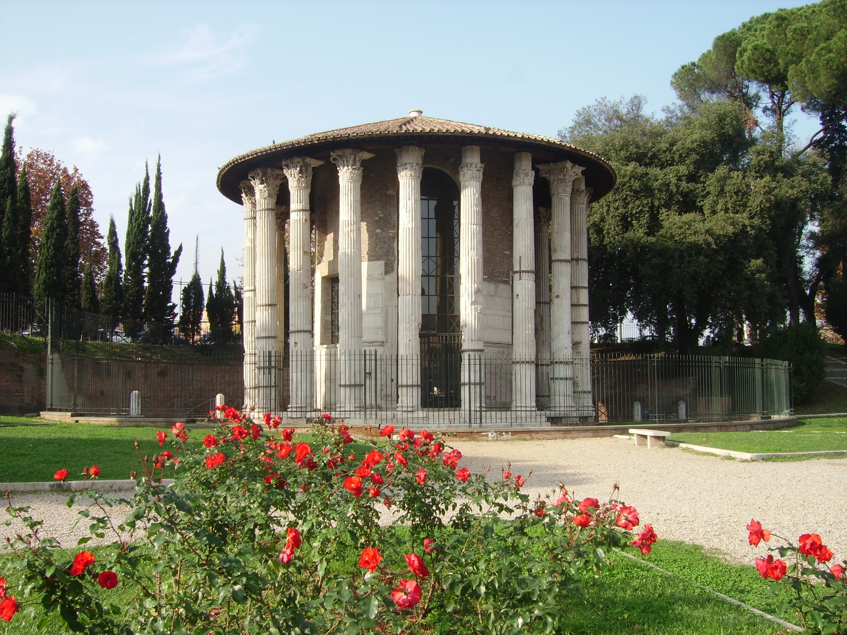 Roma - Tempio di Ercole Vincitore Autore Shardan, opera propria.